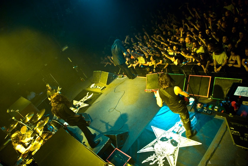 Testament live in concert at The Norva